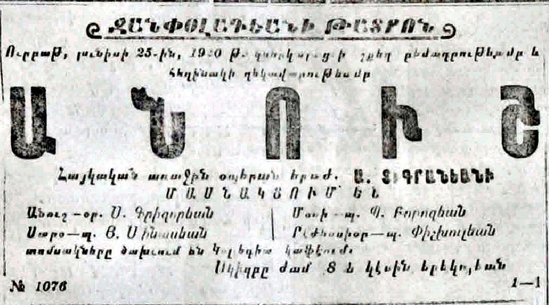 Անուշ օպերայի առազին ներկայացումը Երեւանի մէջ